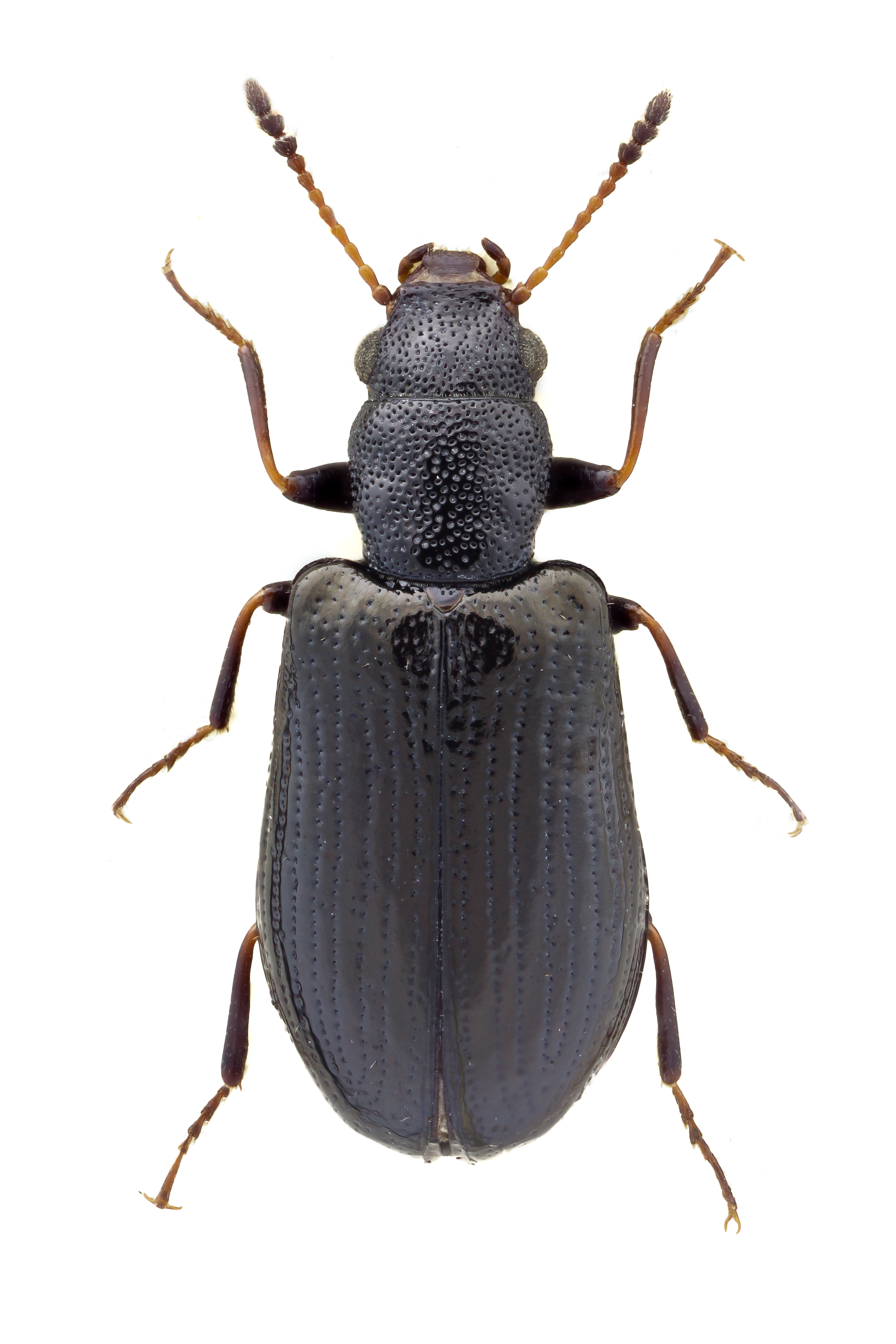 Sphaeriestes stockmanni